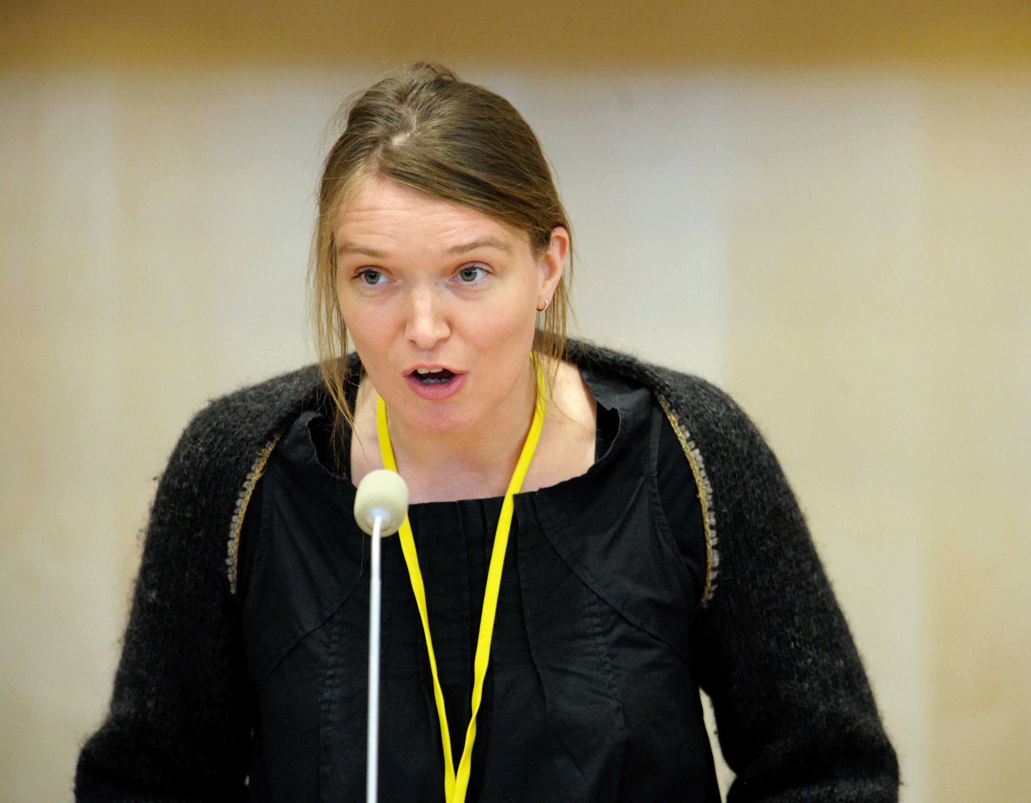 Guðfríður Lilja Grétarsdóttir från Island. Nordiska rådets sessionen i Stockholm 2009.